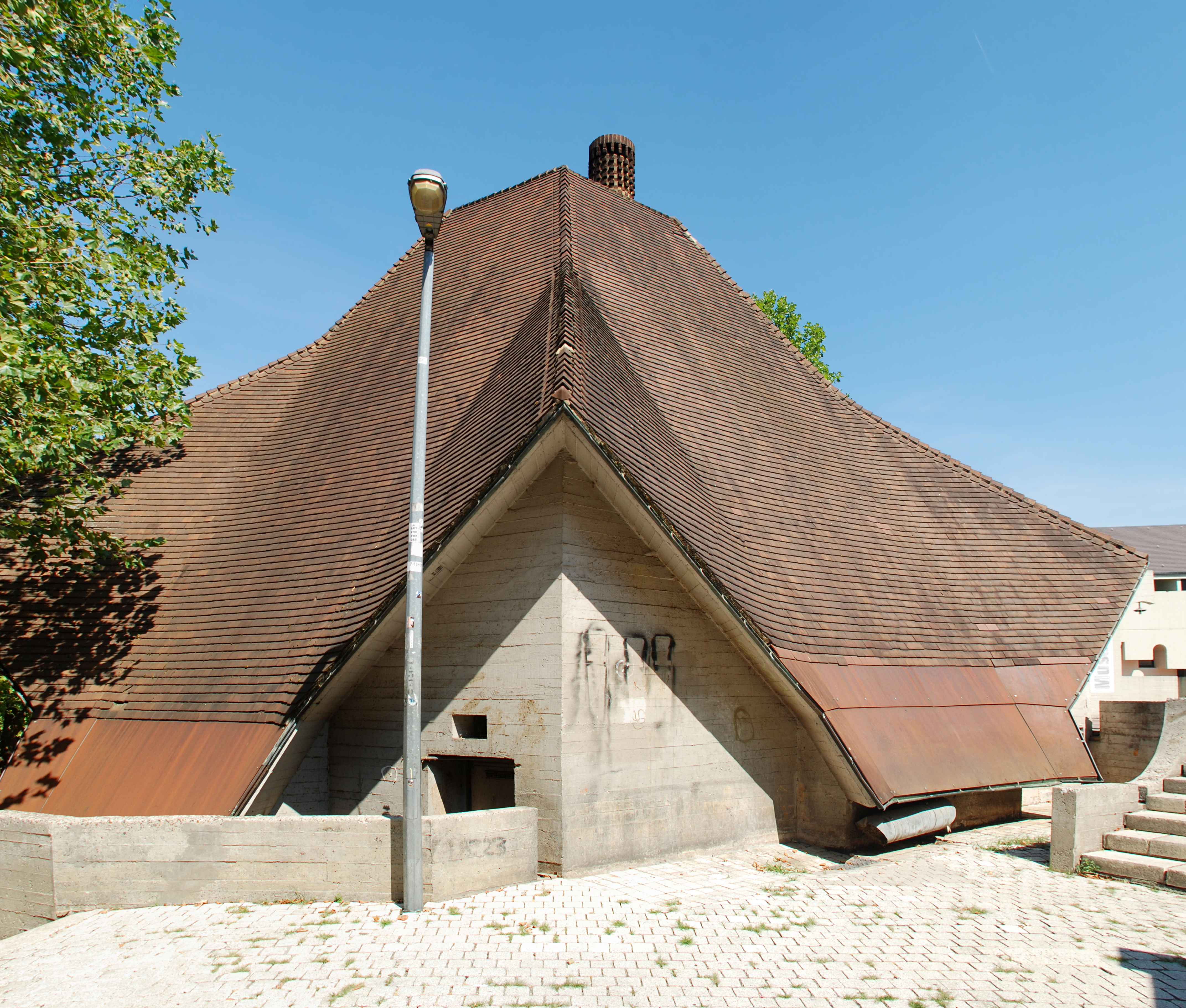 Belgique - Louvain-la-Neuve - Place des Sciences - café dit "Chez Cheops" (photo panoramique) This photo of immovable heritage has been taken in the Walloon Region